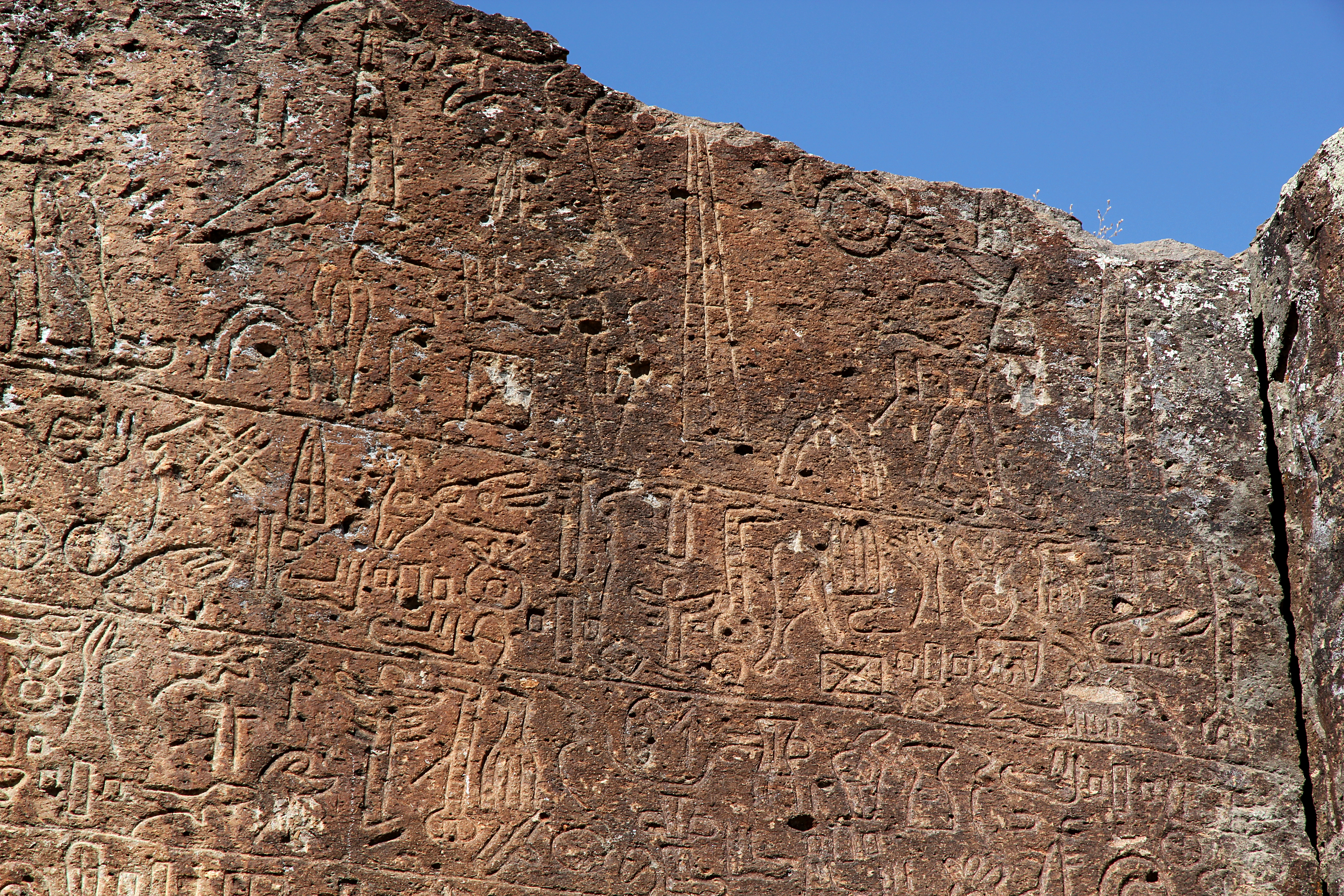 Luwische Felsinschrift von Topada, heute Acıgöl bei Aksaray, Zentraltürkei, Detail, Anfang der Inschrift